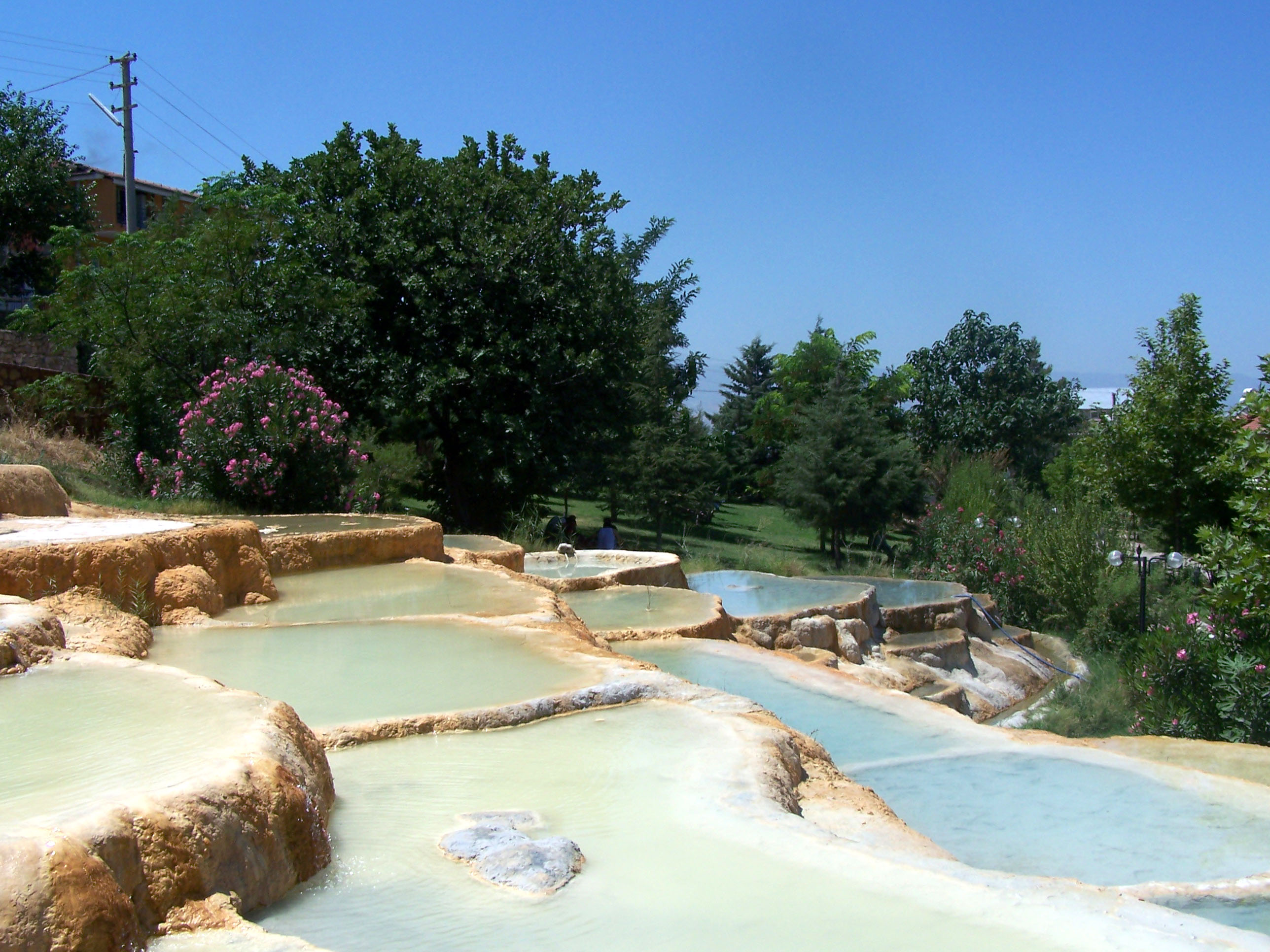 Limestone terraces in Karahayıt, Denizli